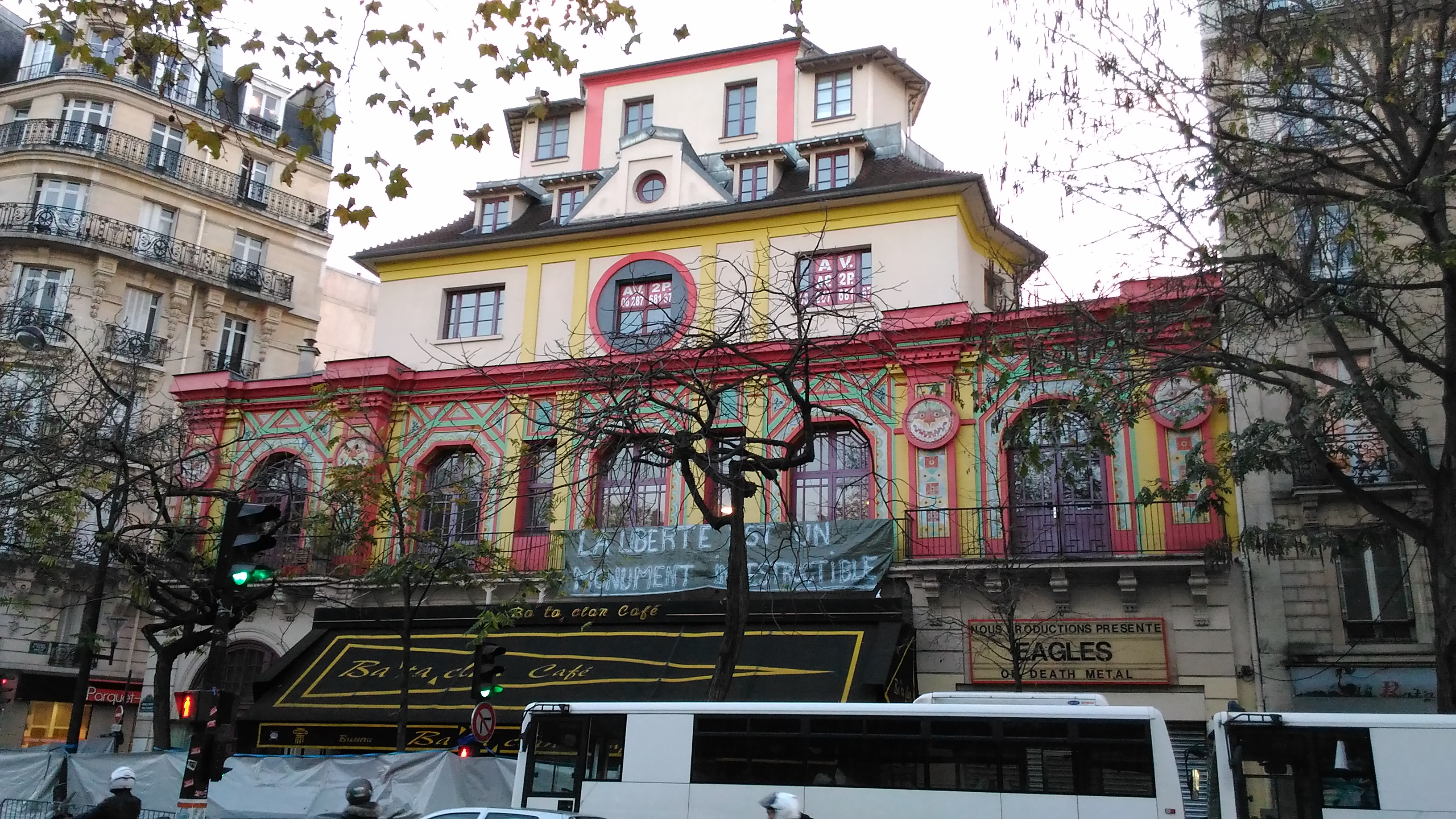 Ảnh chụp rạp hát Bataclan, 52 đại lộ Voltaire, 75011 Paris, Pháp. Trước rạp có ghi show diễn của ban nhạc Eagles of Death Metal và dòng chữ "La Liberté est un monument indestructible" ("Tự Do là một thành tựu không thể bị phá hủy")